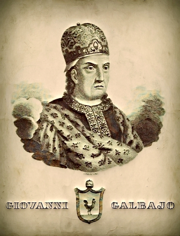 Джованні Гальбайо, 8-й дож Венеції